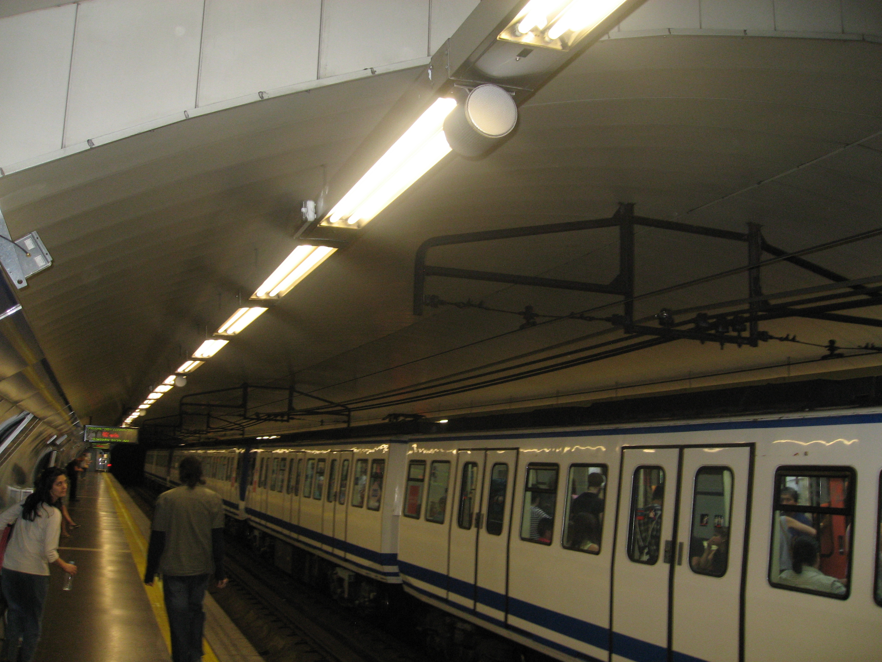 Vista andén de Ríos Rosas